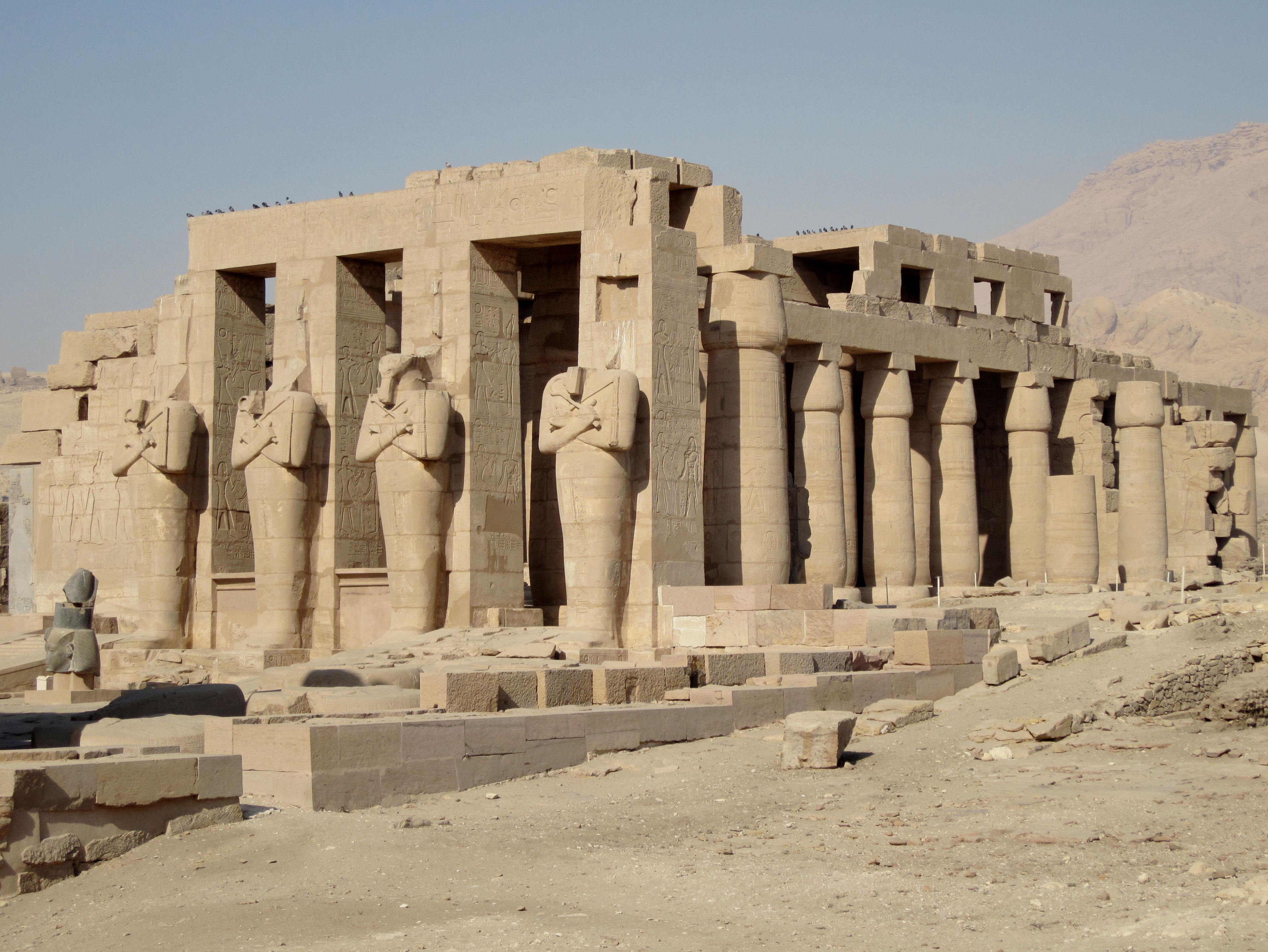 Totentempel des Ramses II. in Theben-West nordwestlich von Luxor, Ägypten